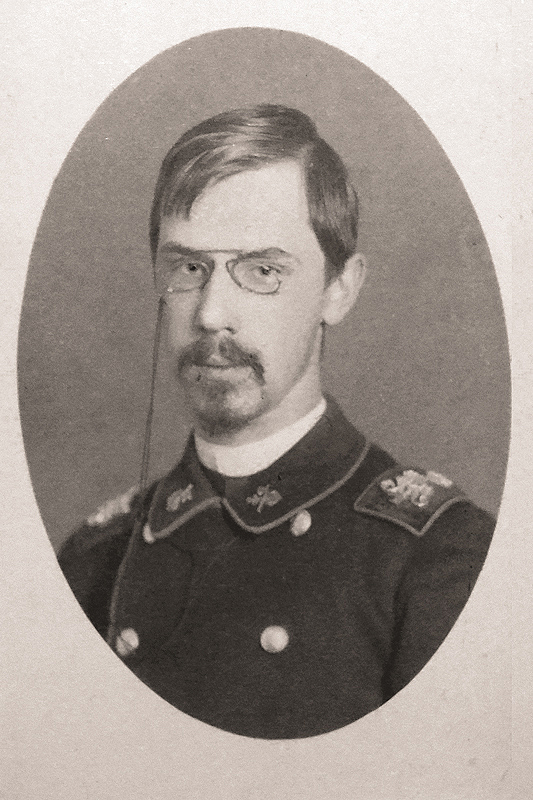 Пётр Николаевич Вознесенский. Санкт-Петербург, 1889 г.